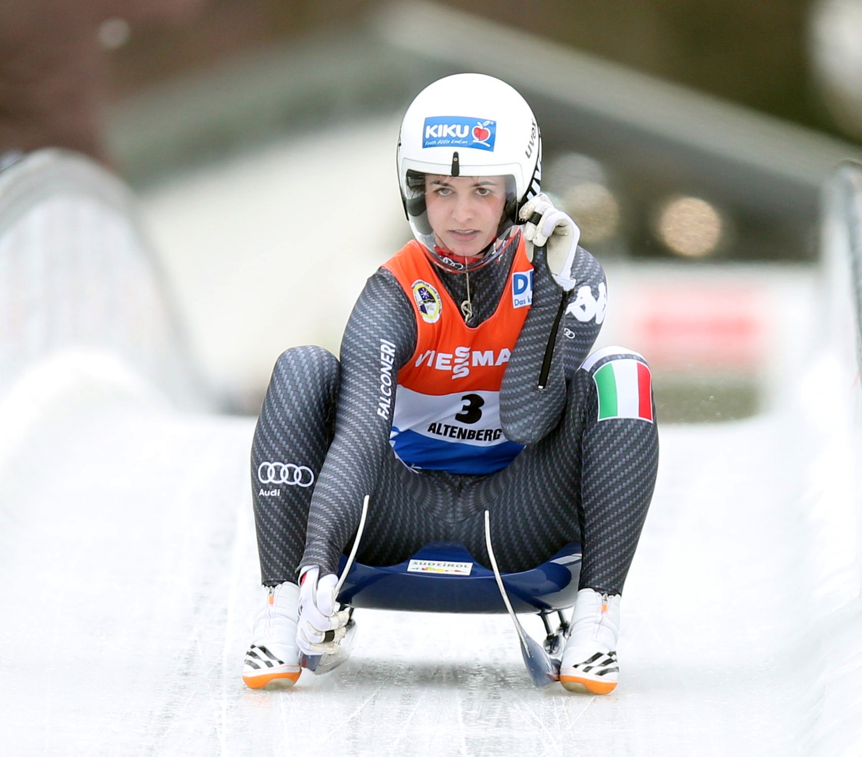 Andrea Vötter beim Rennrodel-Weltcup der Damen in Altenberg 2017